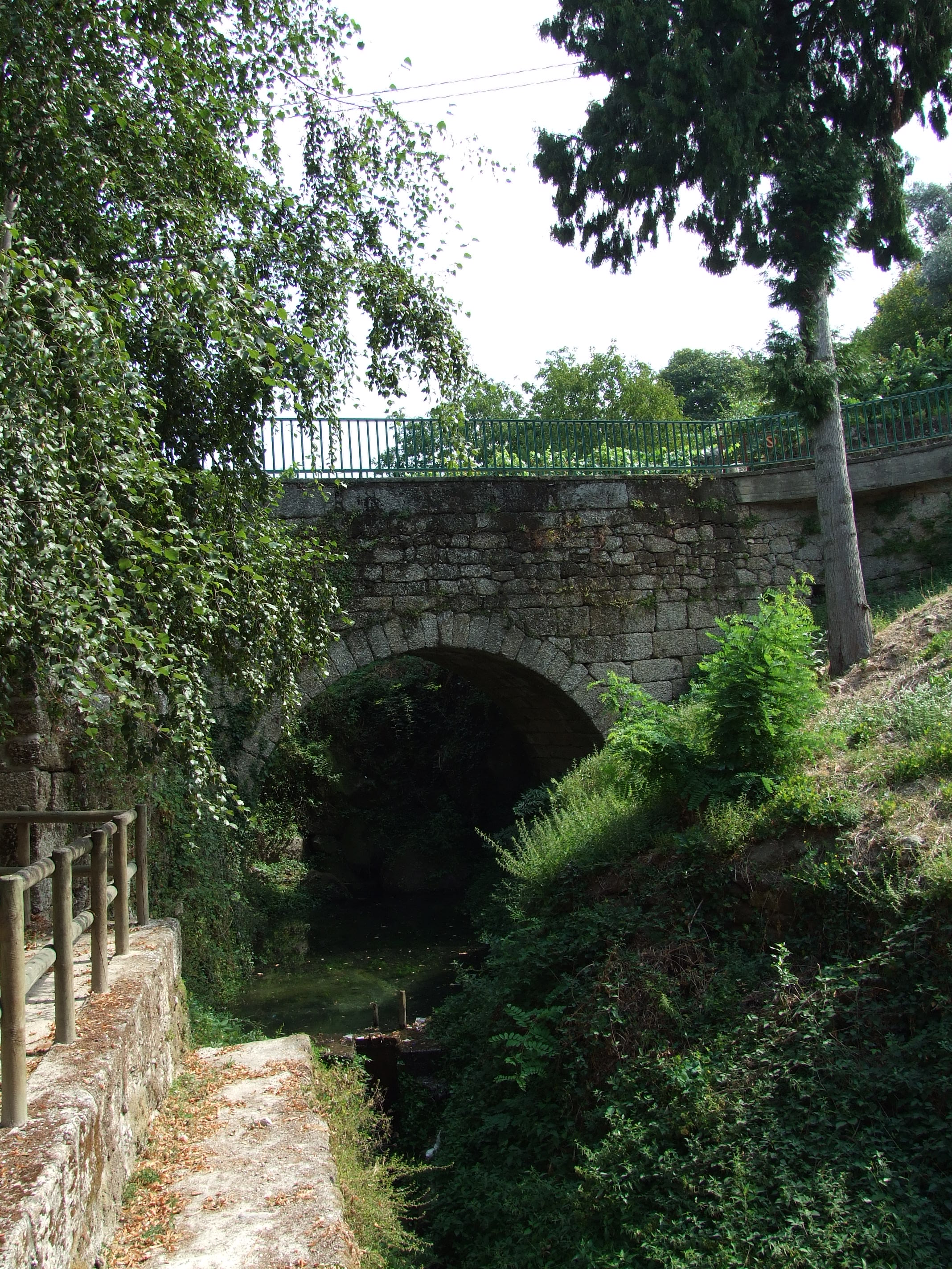 Ponte em Arco, estilo Romano, São Gião, Oliveira do Hospital, Portugal